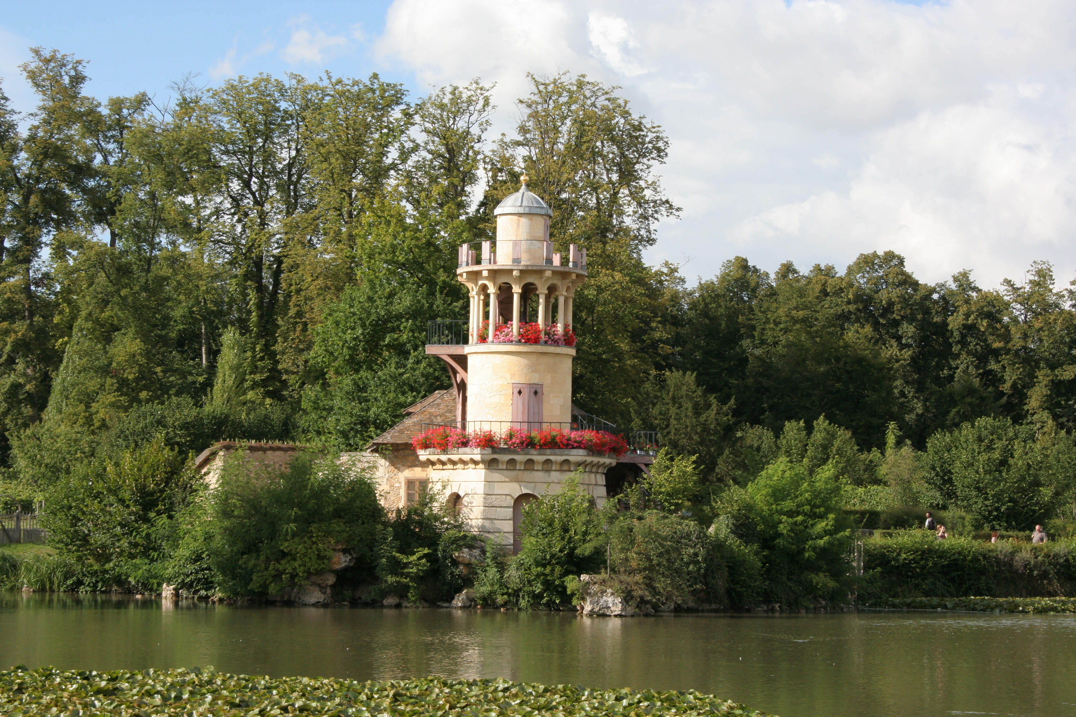 Tour Marlborough au Hameau de la Reine - Versailles